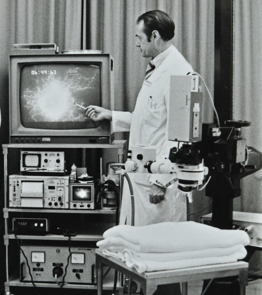 Alfred Bollinger in seinem Mikrozirkulationslabor im Universitätsspital Zürich